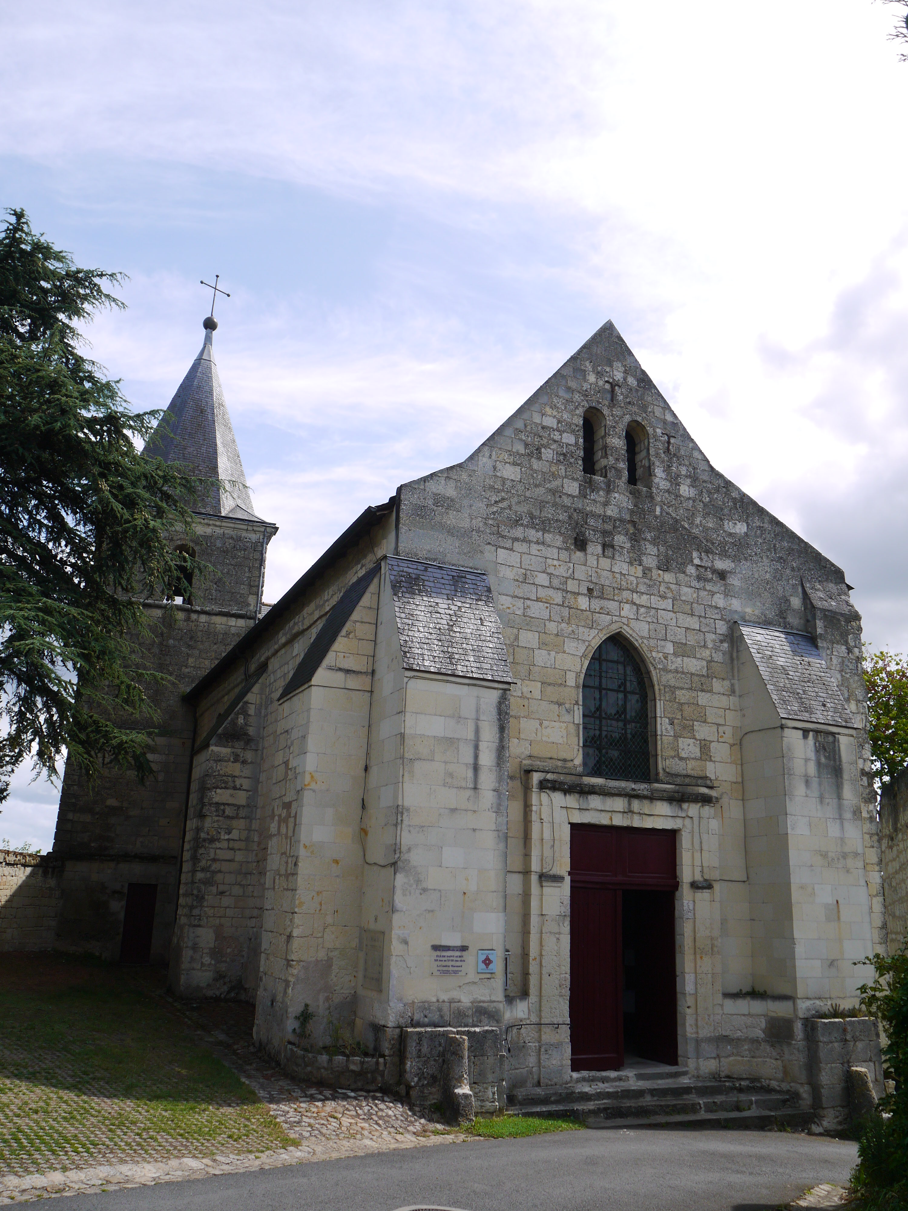 L'église Notre-Dame.